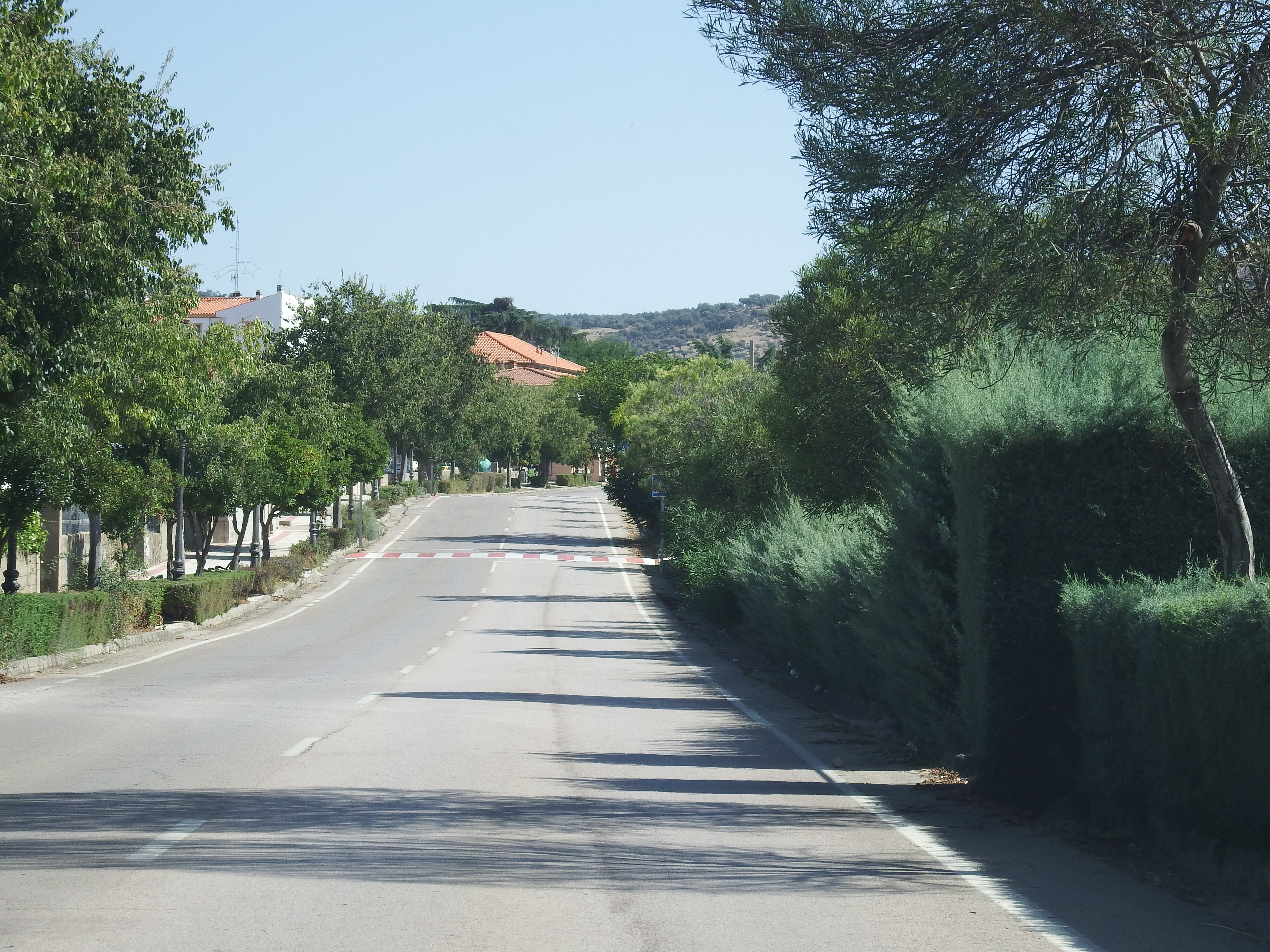 Madroñera